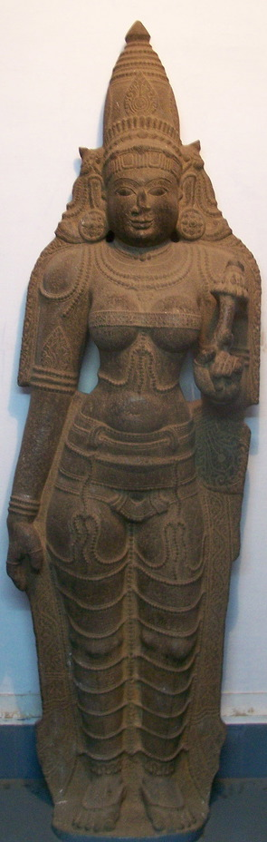 Pandya Sculpture - 2007.